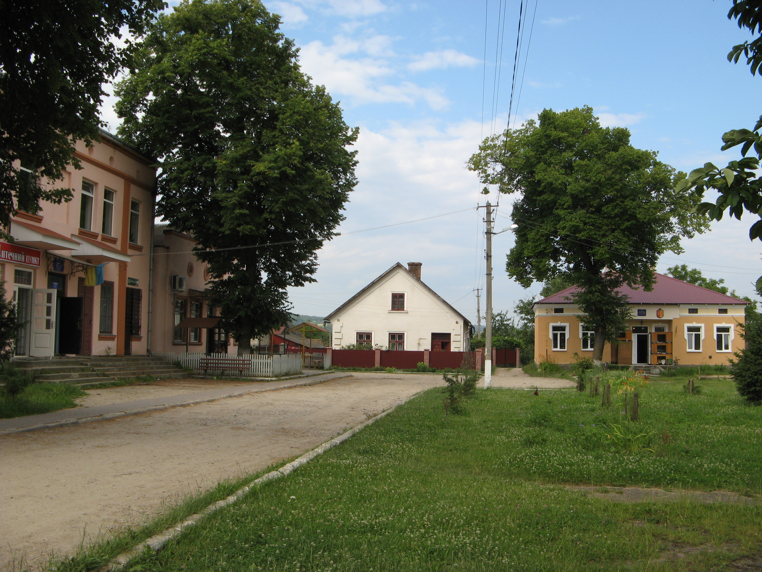 село Нове Місто (Старосамбірський р-н, Львівська обл.)